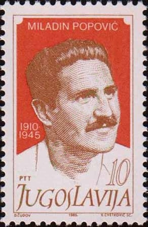 Miladin Popović